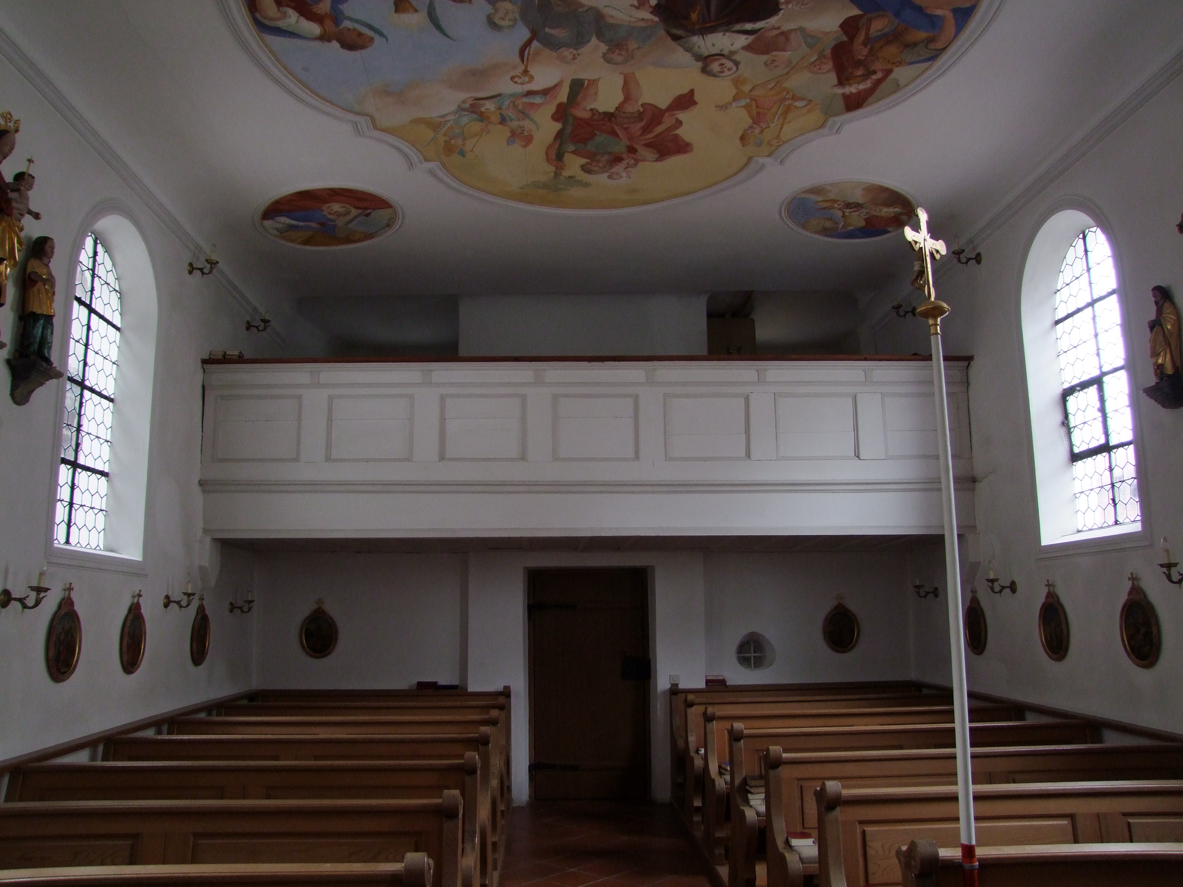 St. Christophorus im oberschwäbischen Frankenhofen bei Bad Wörishofen in Bayerisch/Schwaben